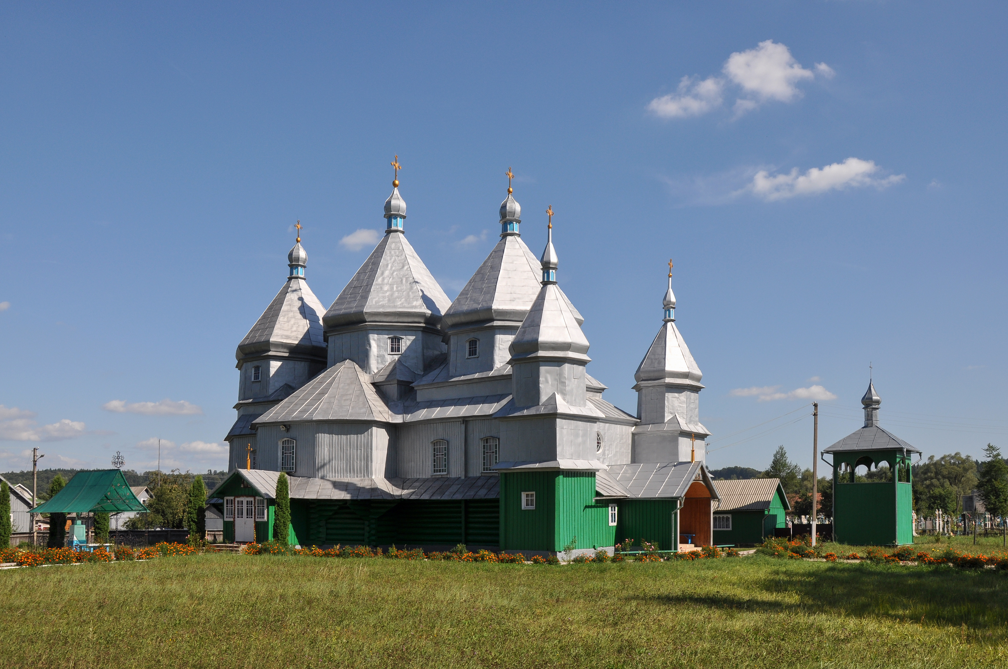 Миколаївська церква (дер.), с. Луківці